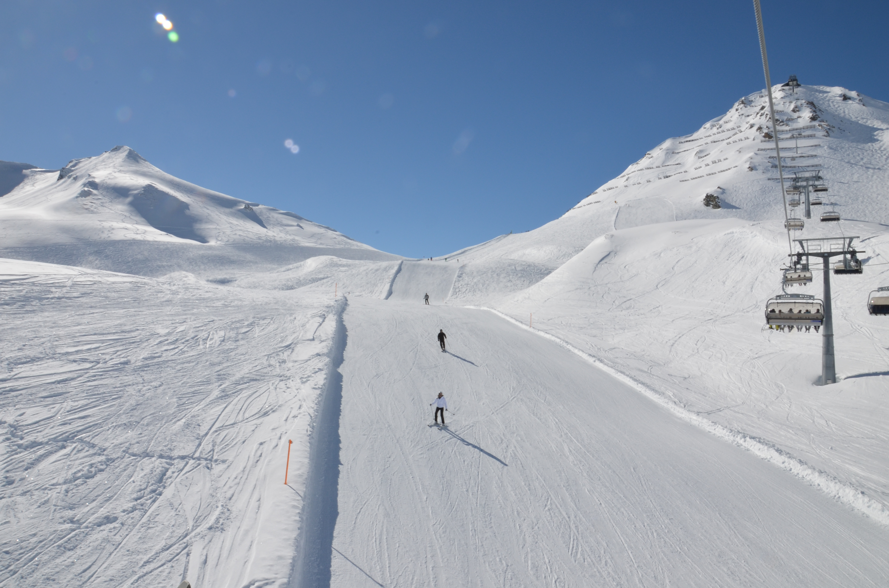 Die Mindersjochabfahr gesehen auf von der Masnerkopfabfahrt